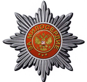 Орден Святой великомученицы Екатерины (Российская Федерация) Звезда